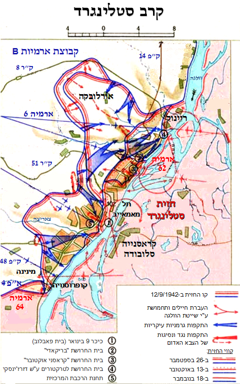 מפה מתורגמת לעברית של קרב סטלינגרד. מפה מקורית - File:Assaut allemand sur Stalingrad.png